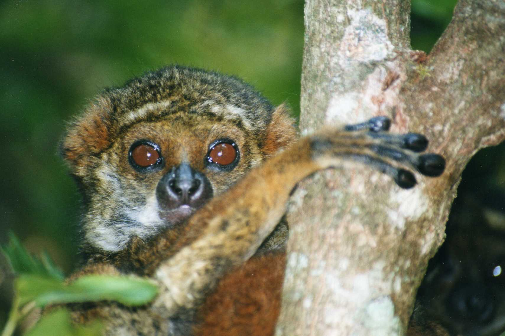 Cette photo a été prise le 25 octobre 2000 en Ifanadiana, Fianarantsoa, Madagascar.